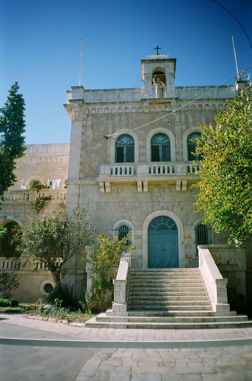 חזית מנזר רטיסבון בירושלים, 2006.